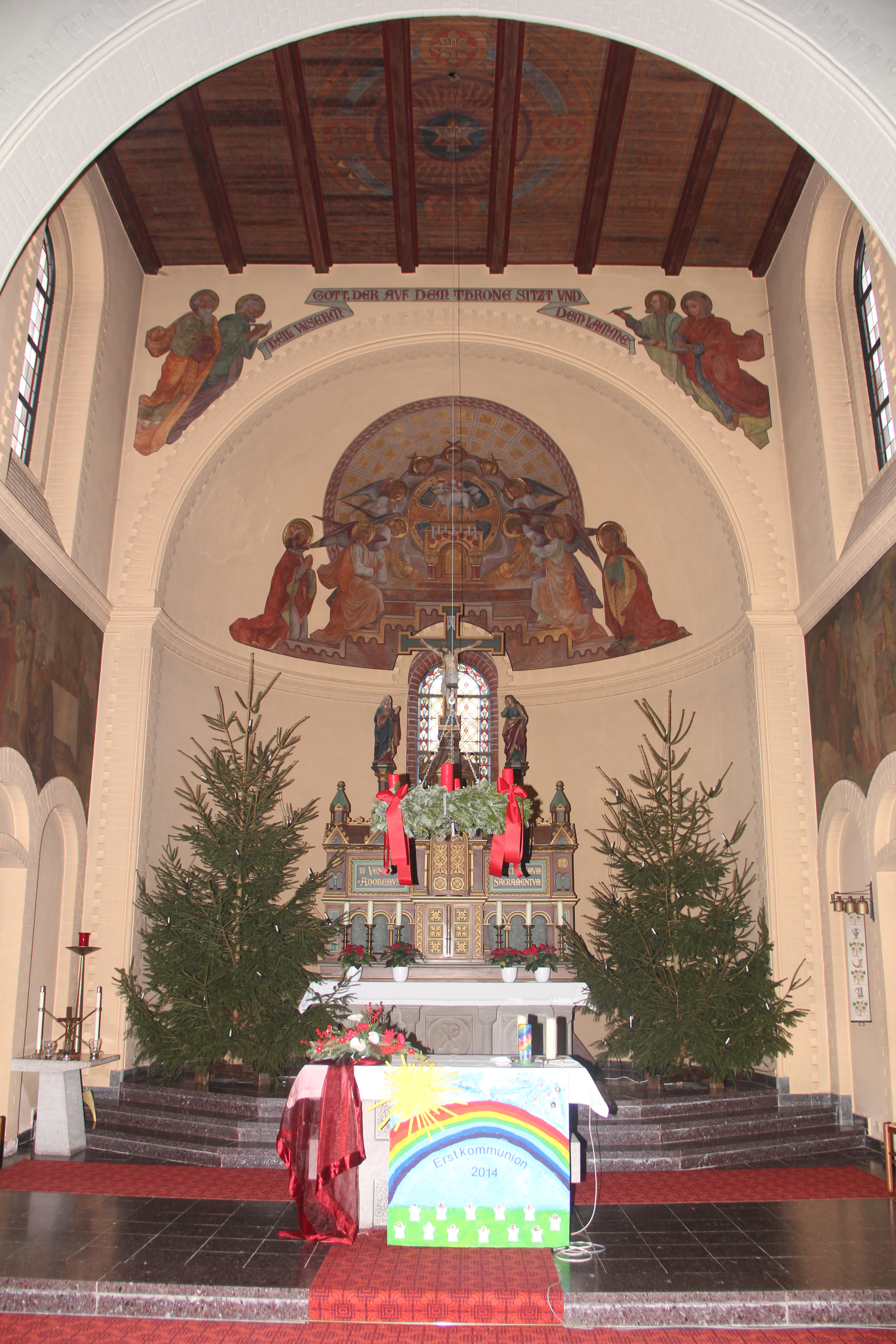 Chorraum der Sankt-Margareta-Kirche in Rollshausen